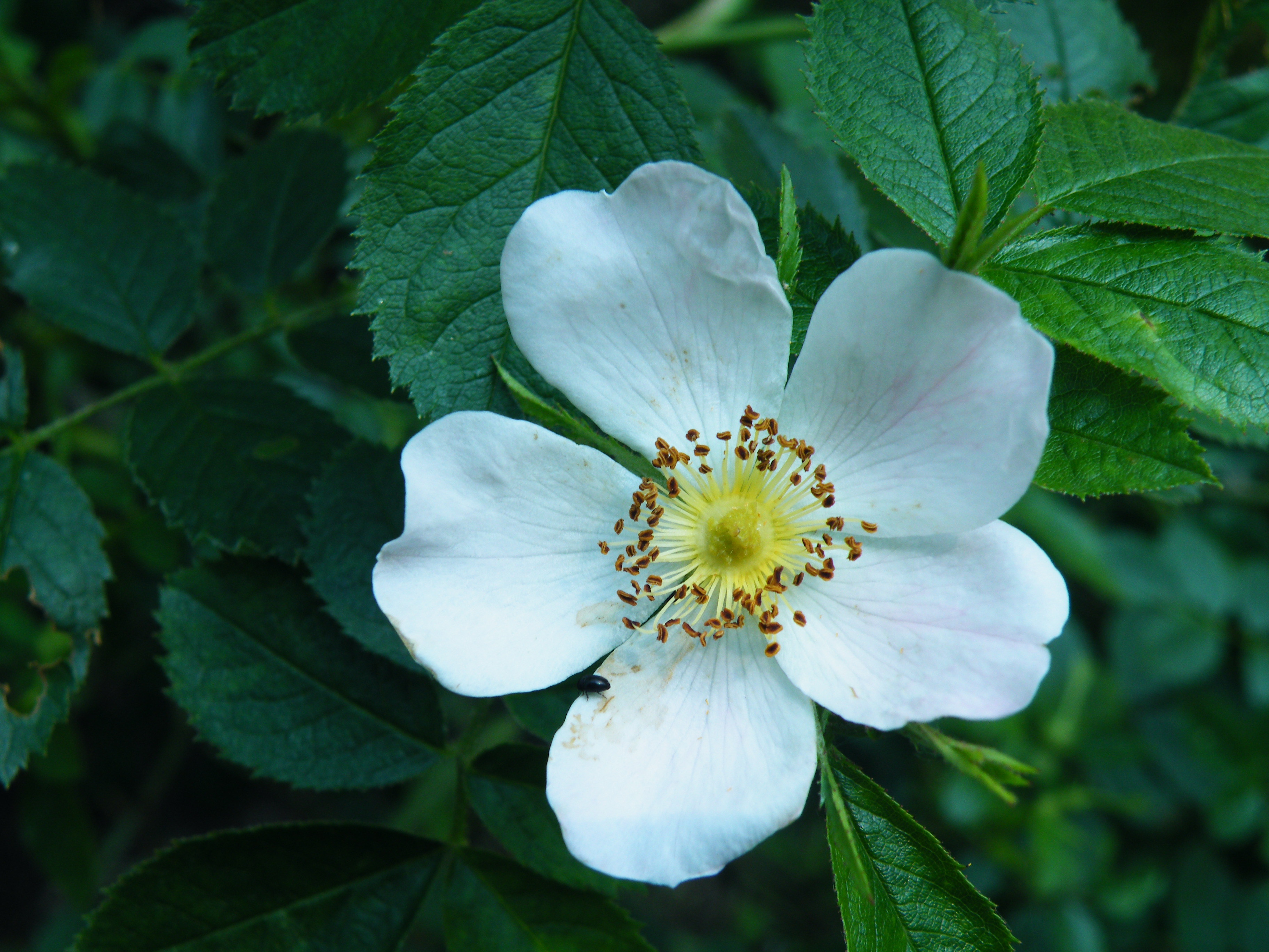 Róża eliptyczna